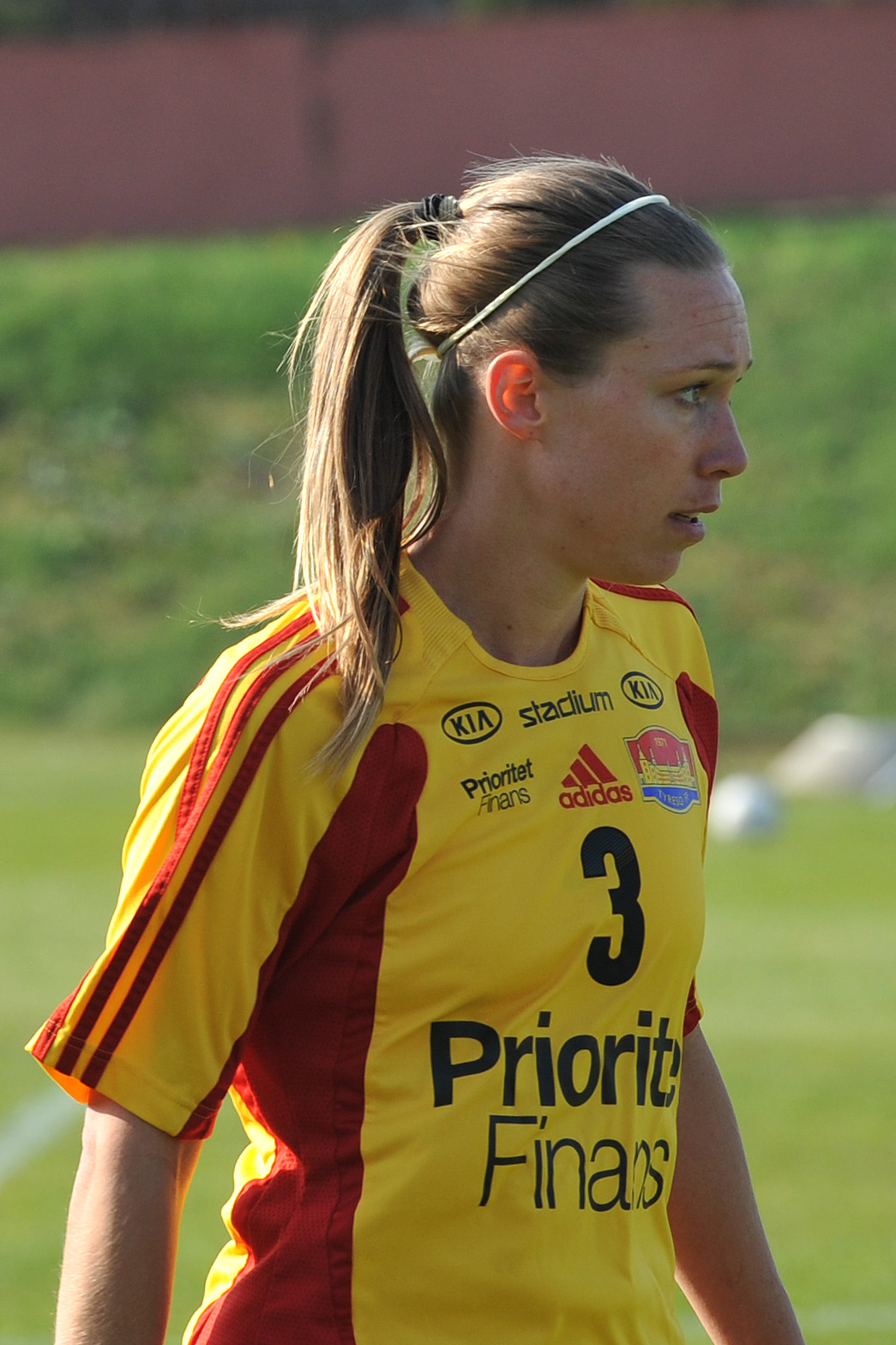 UEFA Women's Champions League 2013/14 SV Neulengbach - Tyresö FF Neulengbach, 29. März 2014 Whitney Engen